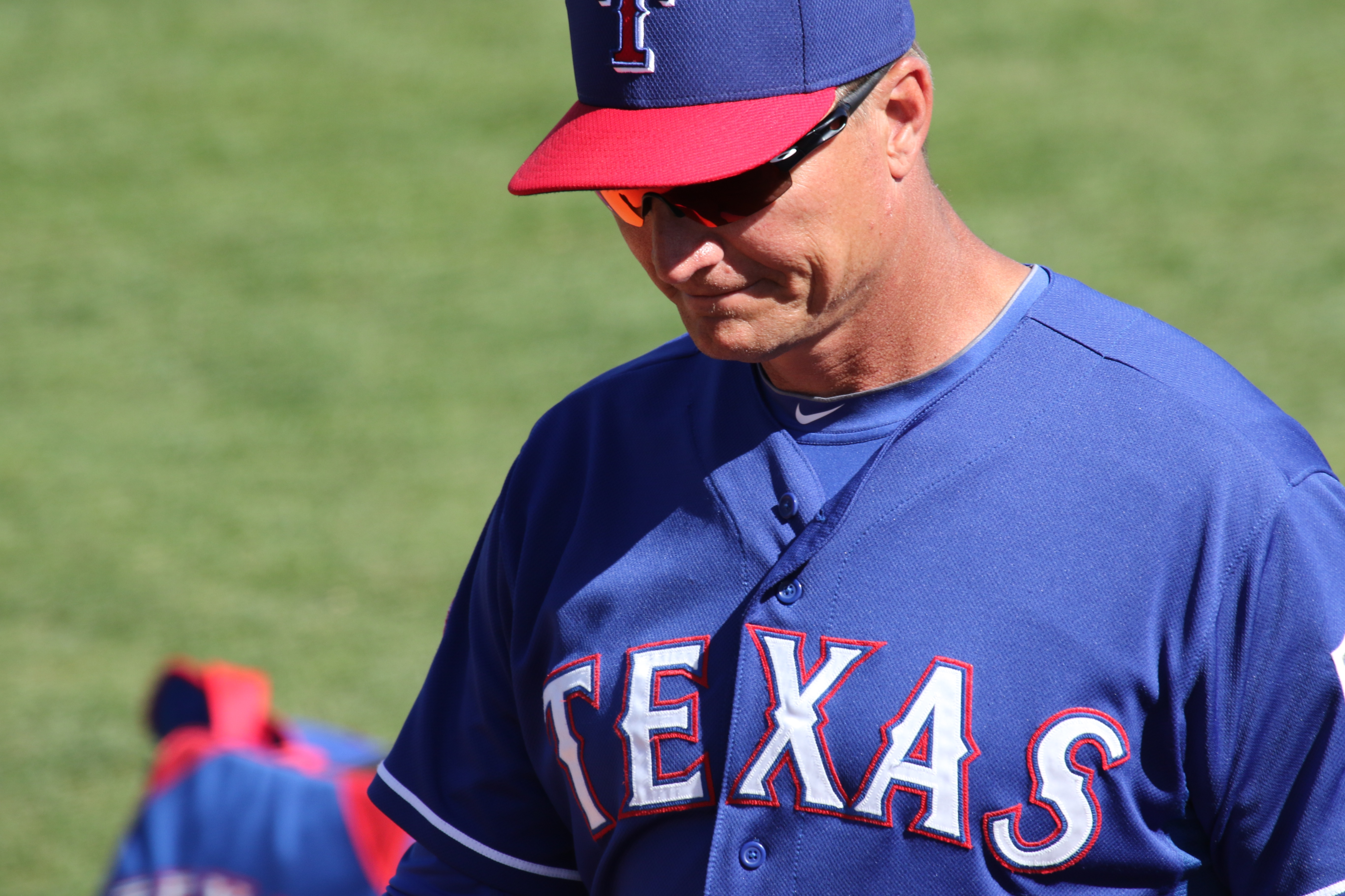 Jeff Banister Texas Rangers